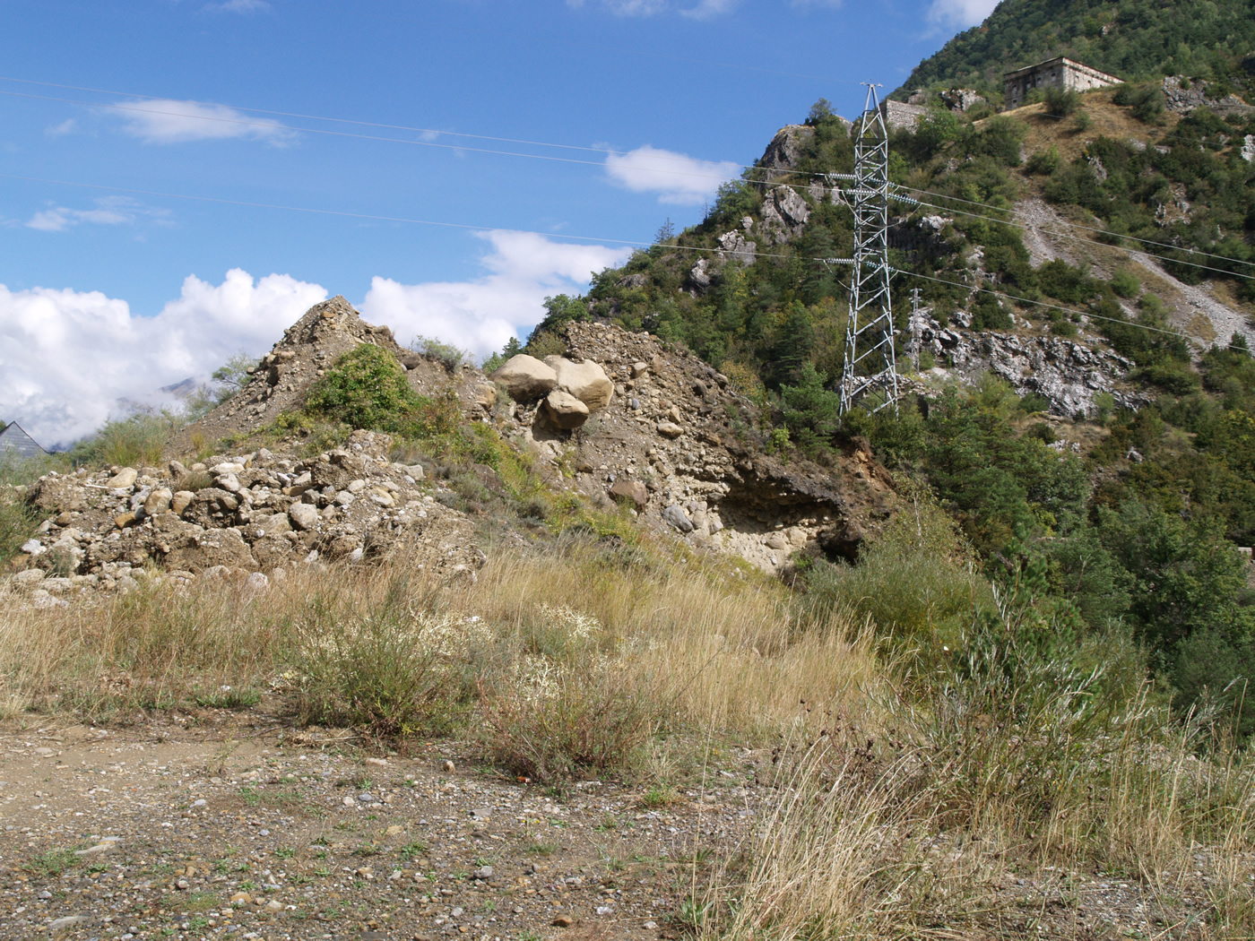 Depósitos morrénicos próximos a la ermita de Santa Elena (cerca de Biescas, Huesca)